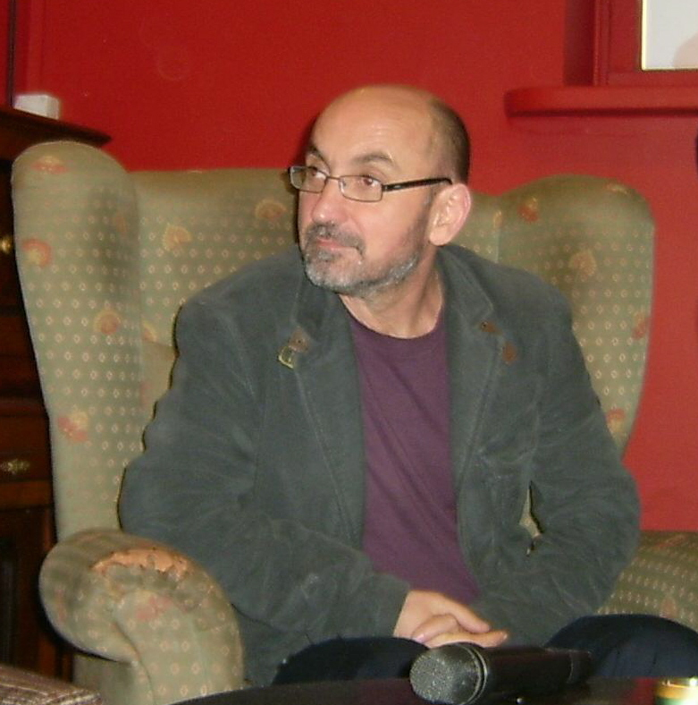 Fatos Lubonja, Warsaw